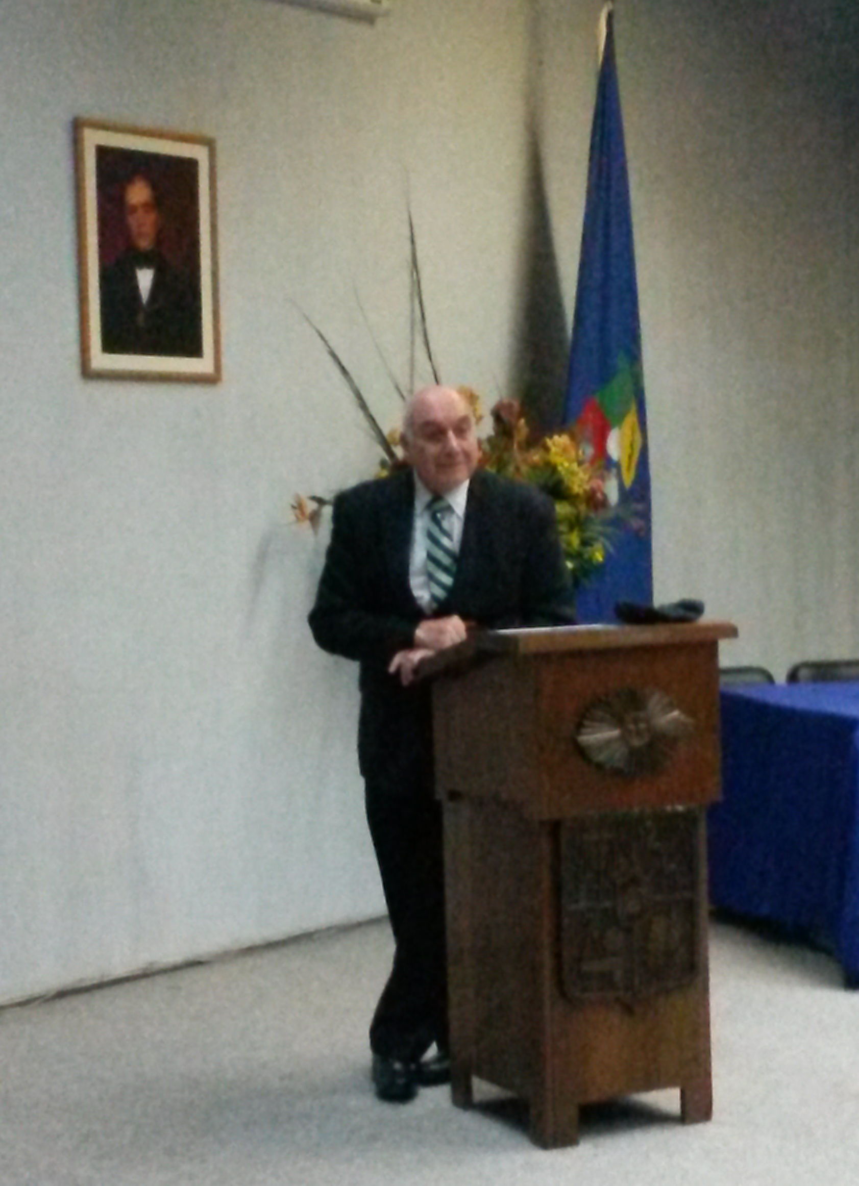 L. Antonio Lizana, ex-Decano Fac. Cs. Agronómicas de la Universidad de Chile